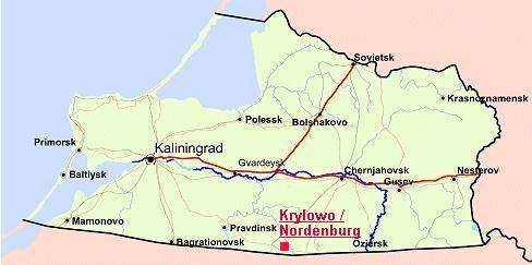 Lokalisation von Krylowo / Nordenburg (Ostpr.)